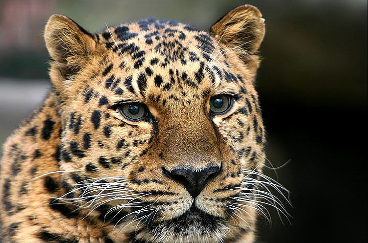 Selbst Fotografiert. Aufgenommen mit einer Canon EOS 300D im Zoo Frankfurt. Fotograf/Quelle: Petra Karstedt / Motiv: Amurleopard (Panthera pardus orientalis)